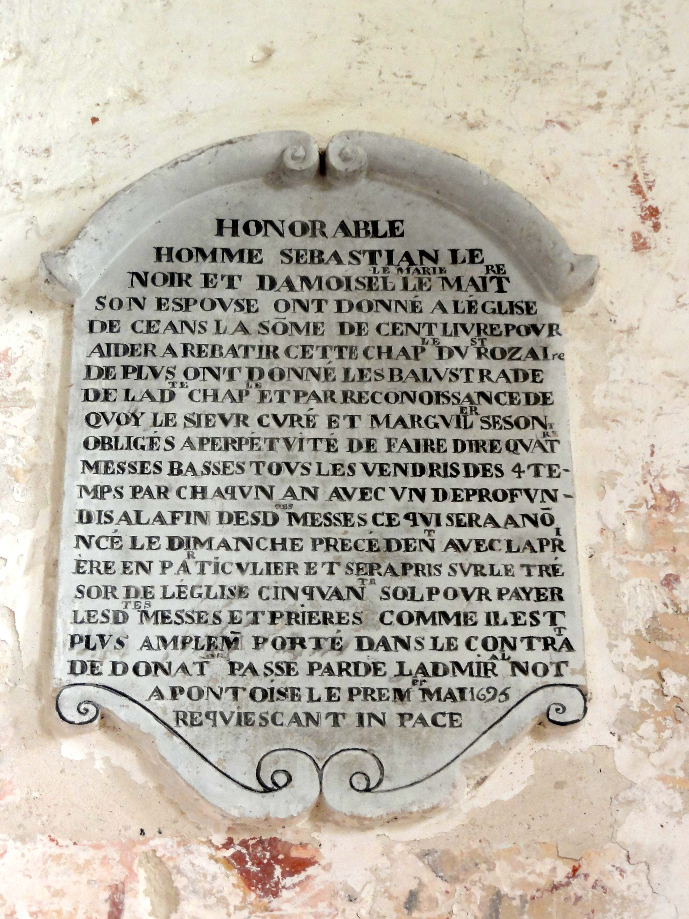 Mobilier de l'église (voir titre).